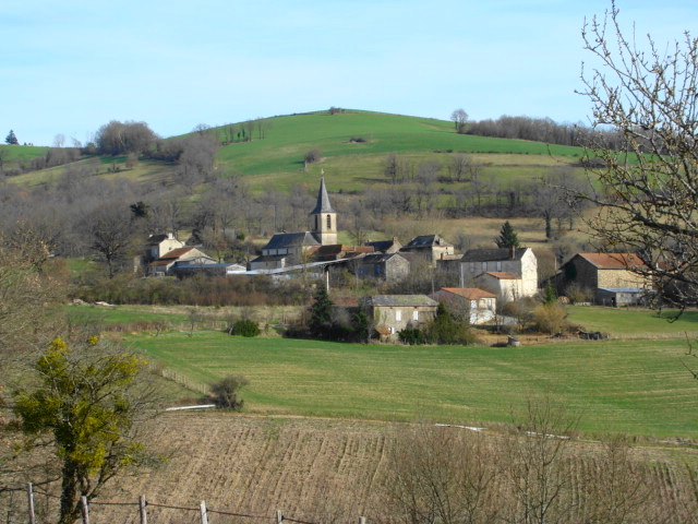 Le village vu de la route en direction du Puech de la Tour